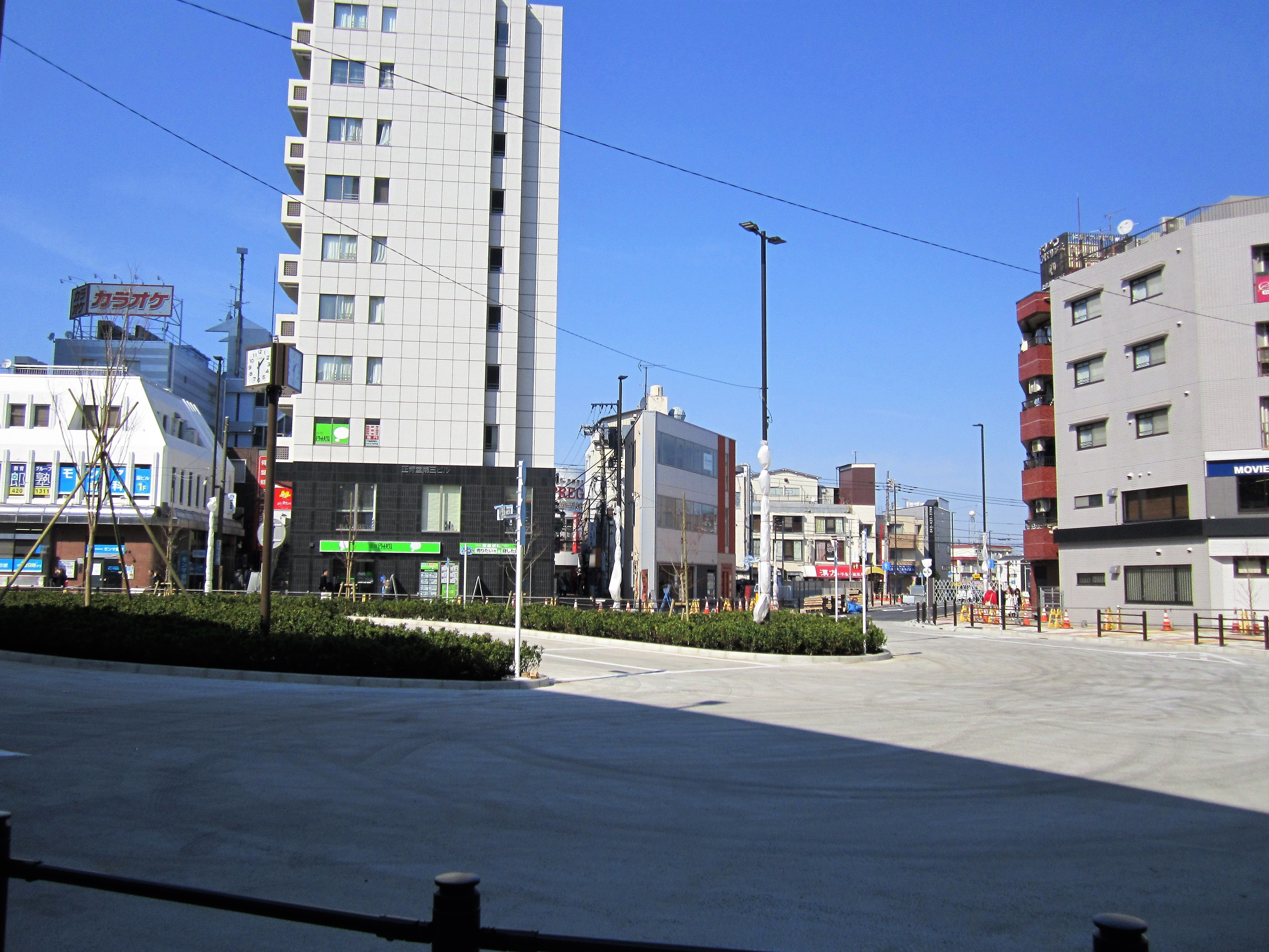 ひばりヶ丘駅北口の駅前広場と接続する都市計画道路（工事中の2019年3月2日撮影） Canon PowerShot A2200